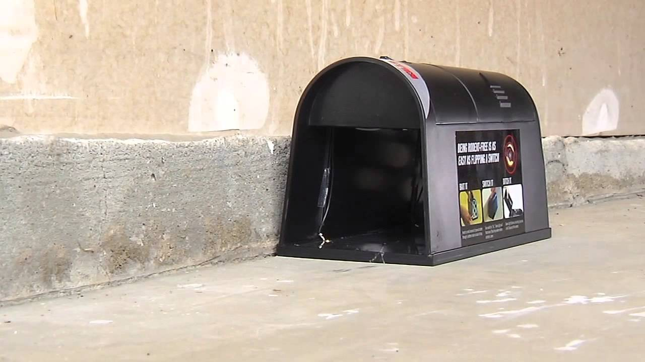 Piège à souris électrique Victor